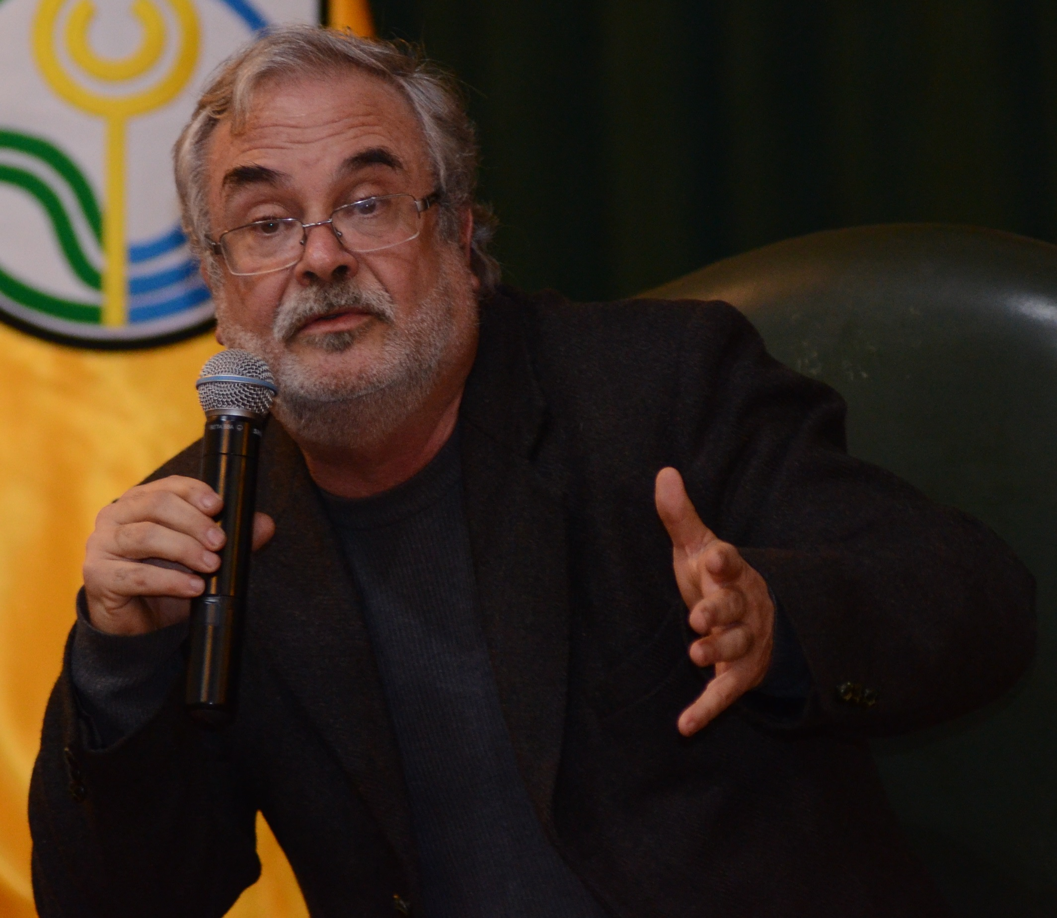 El director de cine peruano Augusto Tamayo durante su exposición "40 años haciendo cine en el Perú" en Miraflores.